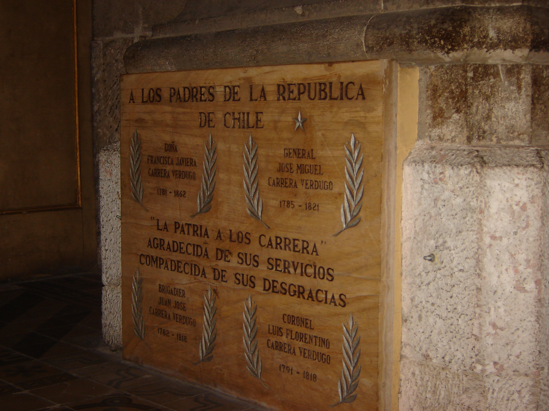 Lápida de madera tallada a la memoria de los hermanos Carrera (Juan José, Luis, José Miguel y Francisca Javiera), cuya tumba aún permanece sin ubicar dentro del edificio catedralicio. Se encuentra junto a la puerta de la calle Catedral y es obra del escultor chileno Héctor Román.